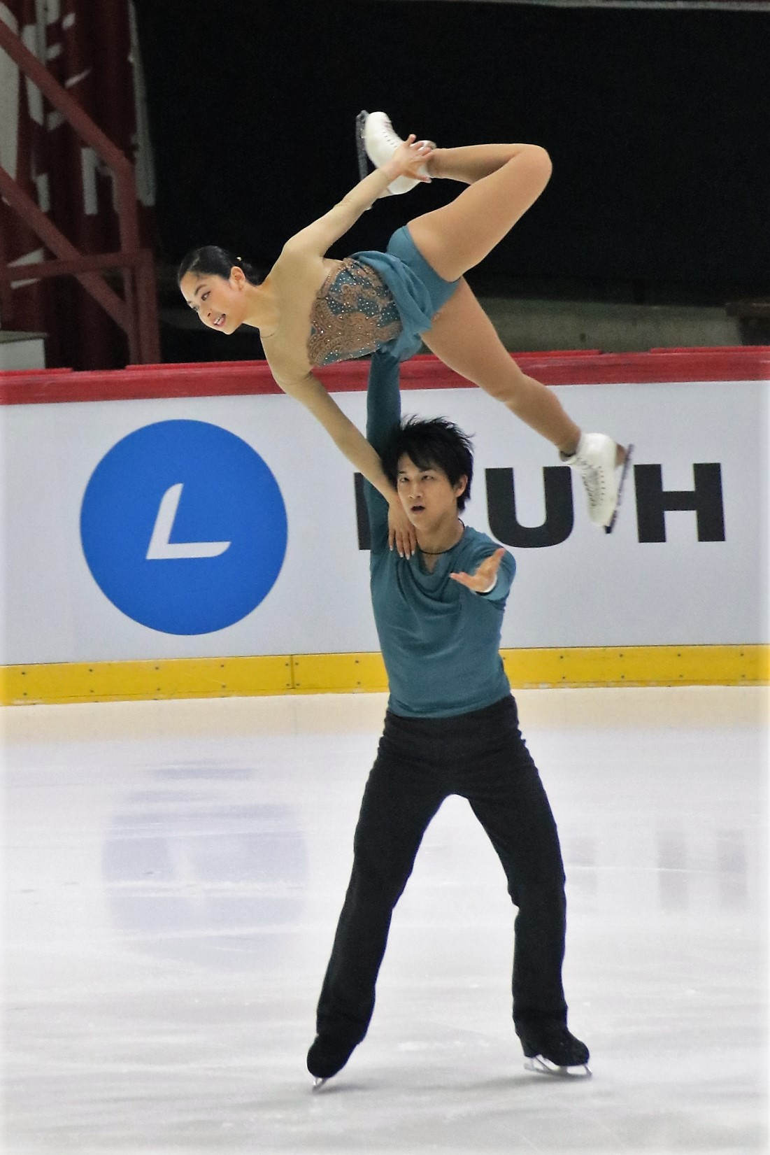 Миу Судзаки / Рюити Кихара (Япония) на Гран-при Хельсинки 2018.